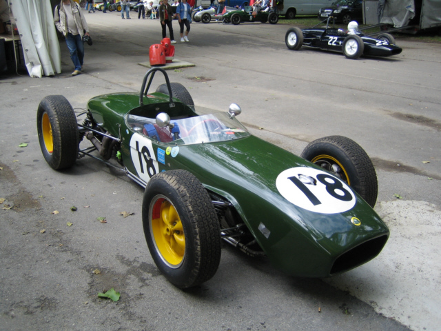 Lotus 18 and Lotus 18/21 see differences Pau GP 2007